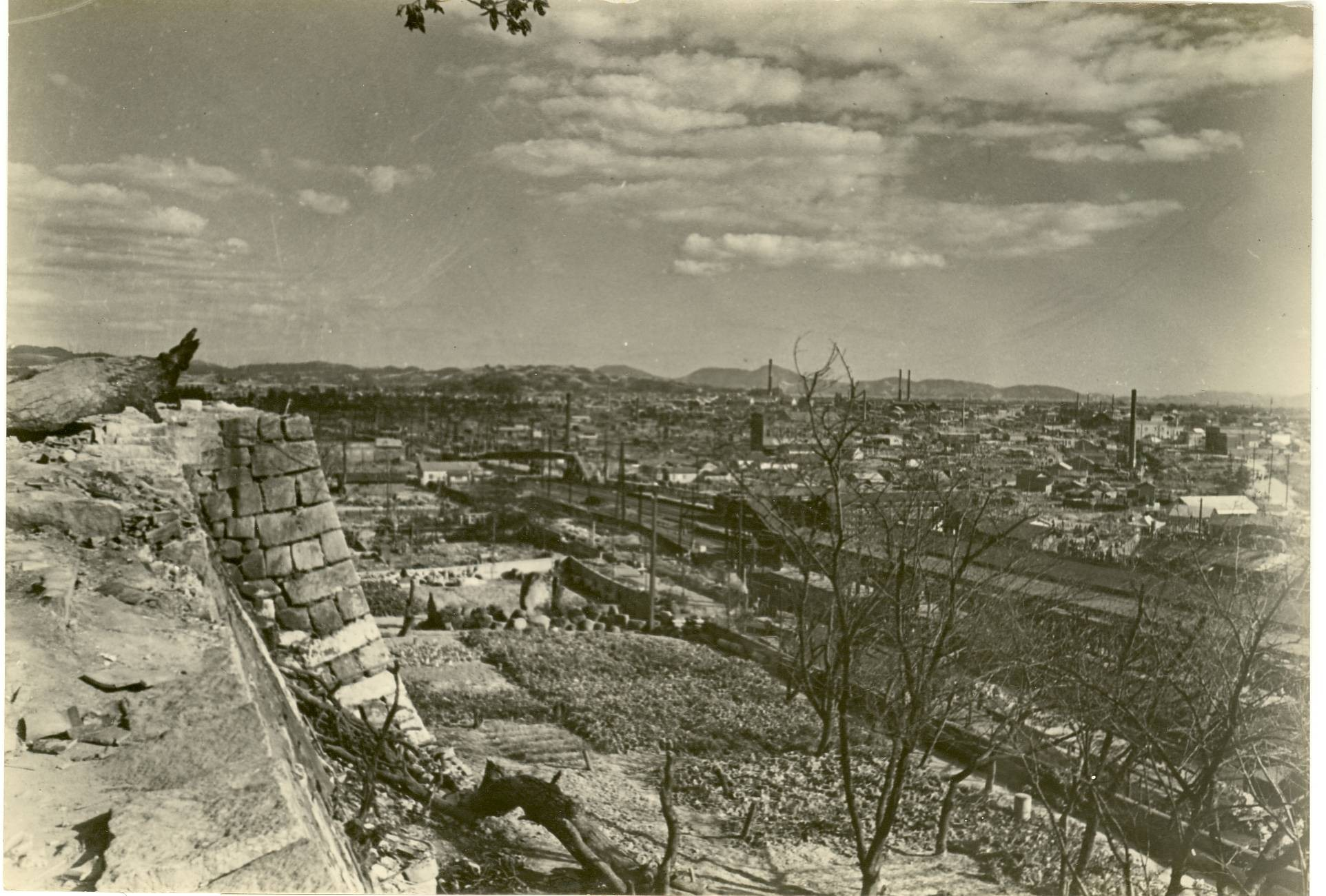 福山城月見櫓付近からの撮影